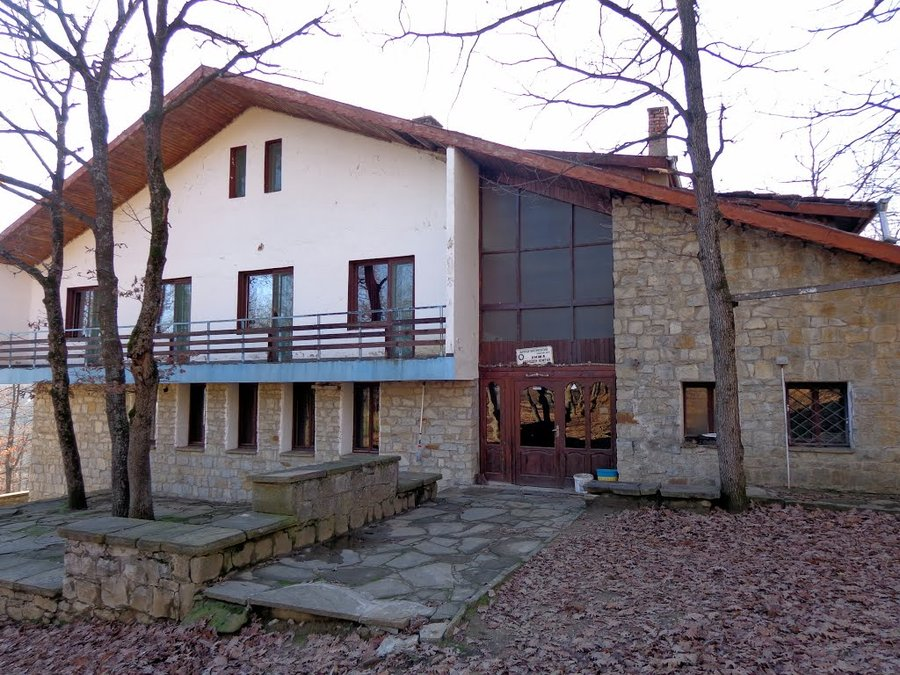 Хижа Топчийско